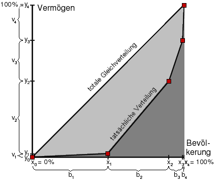 This image was copied from de. The original description was: Beispiel-Lorenzkurve für Gini-Koeffizient, selbstgezeichnet, GFDL